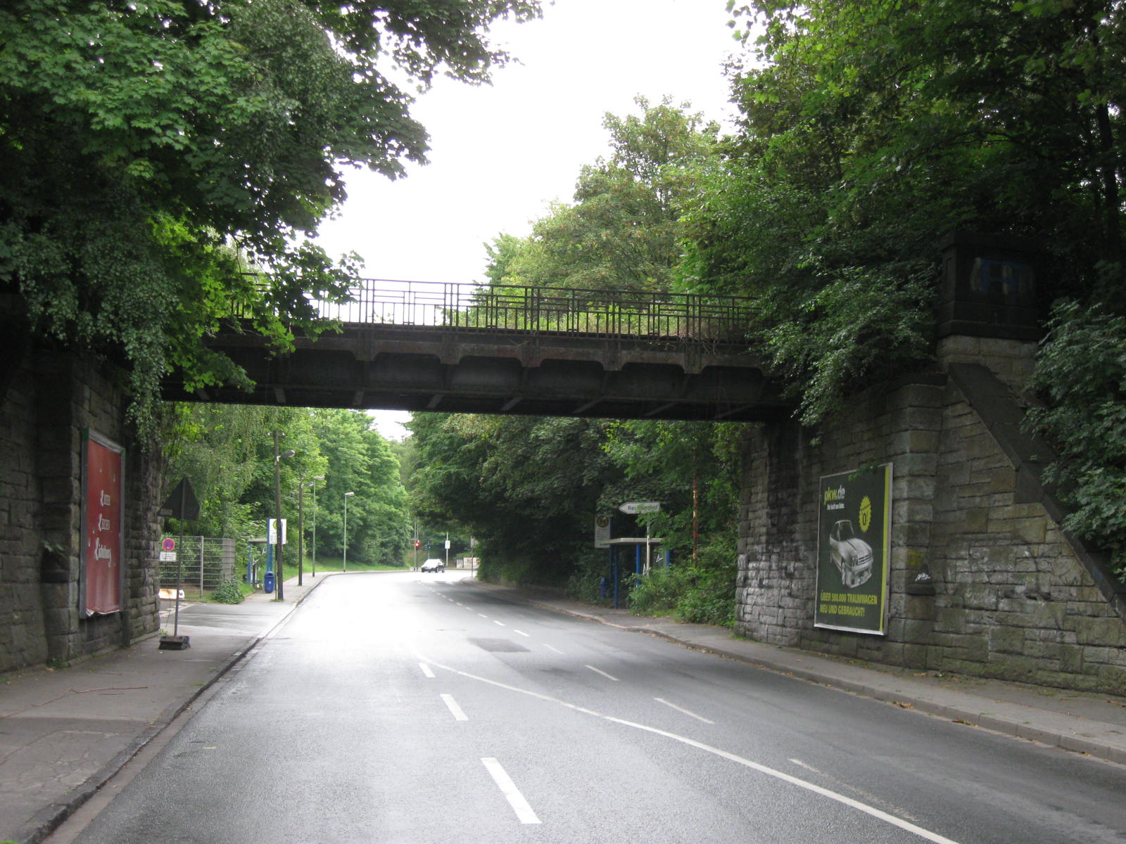 ehemalige Eisenbahnbrücke der Verbindung Essen-Altenessen – Essen-Stoppenberg über die Lierfeldstraße in Essen-Altenessen